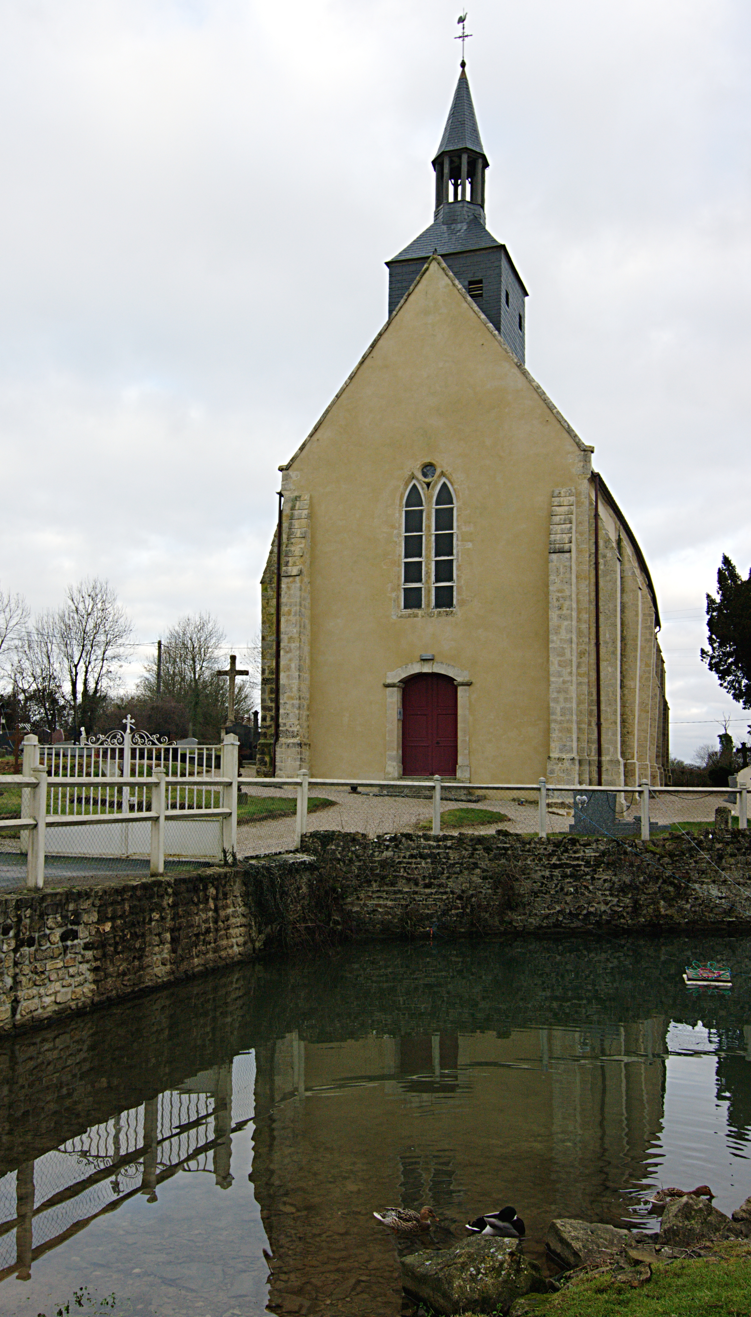 l'église Saint-Martin à Martigny-sur-l'Ante, Calvados.